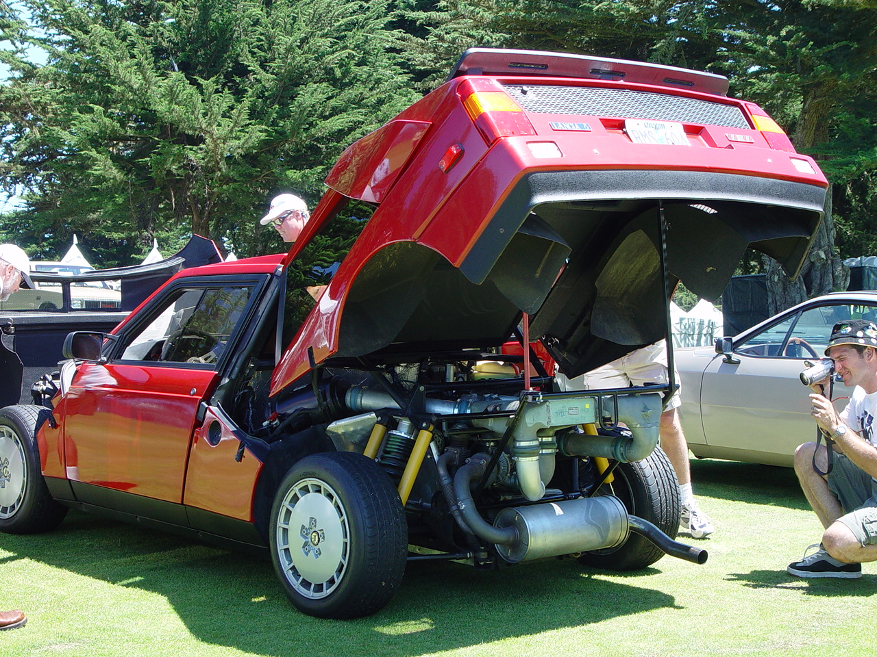 DSC09590 1985 Lancia Delta S4 Stradale at 2003 Concorso Italiano, Seaside, CA.